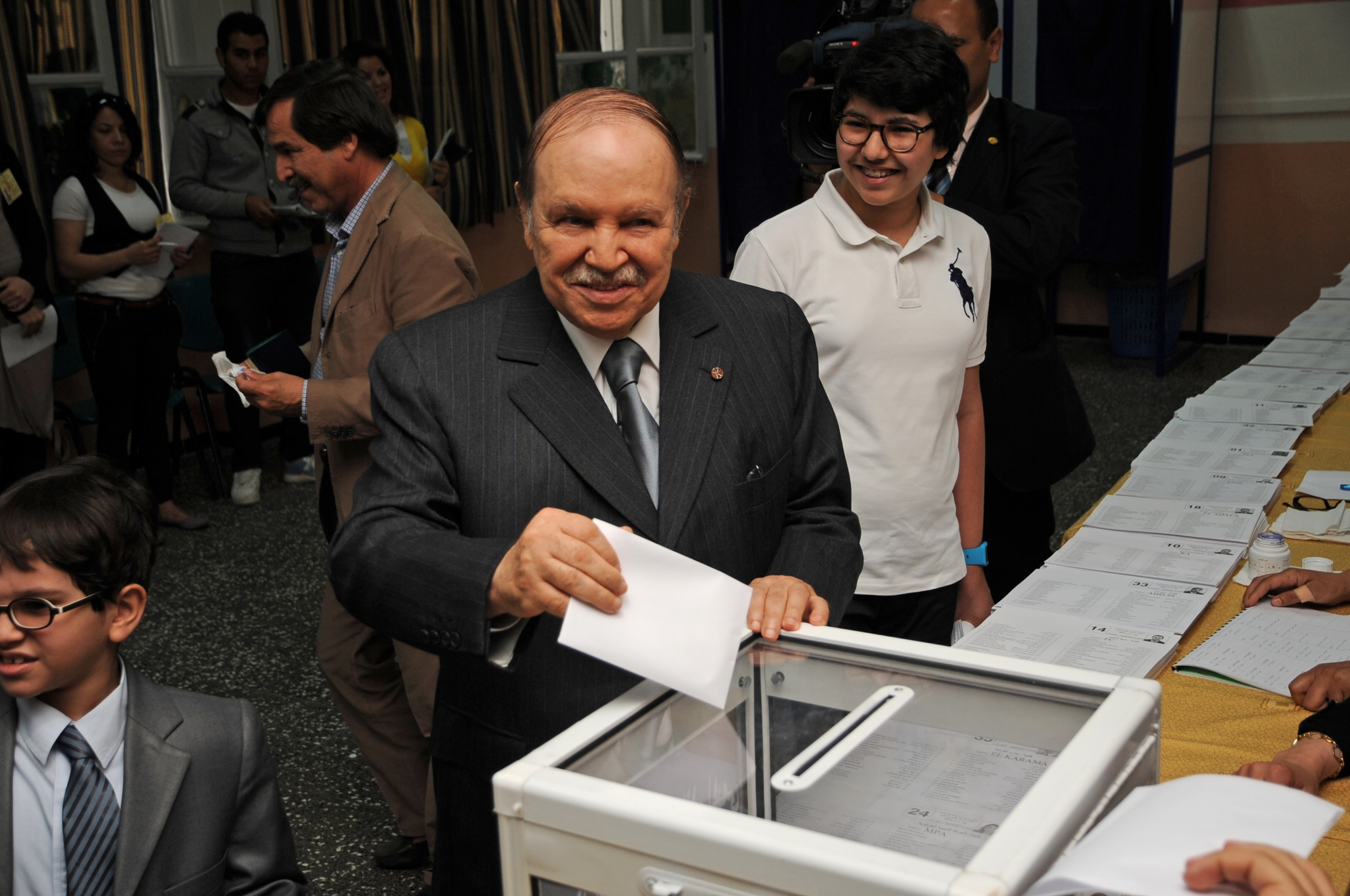 Algerian President Abdelaziz Bouteflika casts his ballot in May 10th's legislative election. الرئيس الجزائري عبد العزيز بوتفليقة يدلي بصوته في الانتخابات التشريعية يوم 10 مايو. Le Président algérien Abdelaziz Bouteflika dépose son bulletin dans l'urne lors des élections législatives du 10 mai.